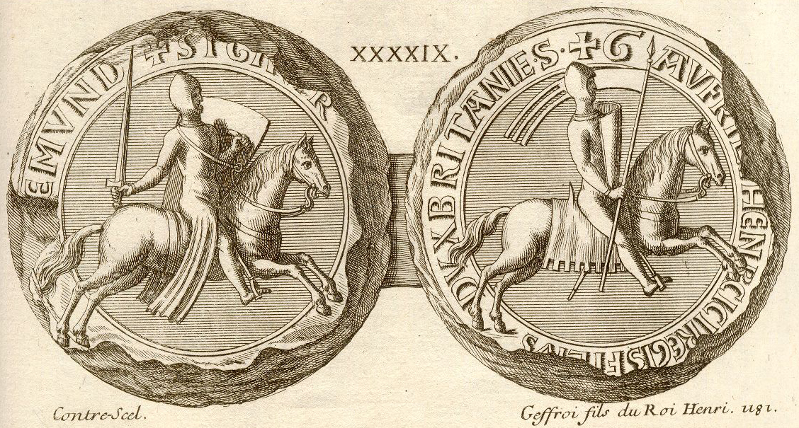 Scan d'un Sceau provenant des "Mémoires pour servir de preuves à l’histoire ecclésiastique et civile de Bretagne, tirés des archives de cette province, des celles de France & d’Angleterre, des Recueils de plusieurs savants Antiquaires, & mis en ordre, par Dom Hyacinthe Morice, Prêtre, Religieux Bénédictin de la Congrégation de S. Maur"